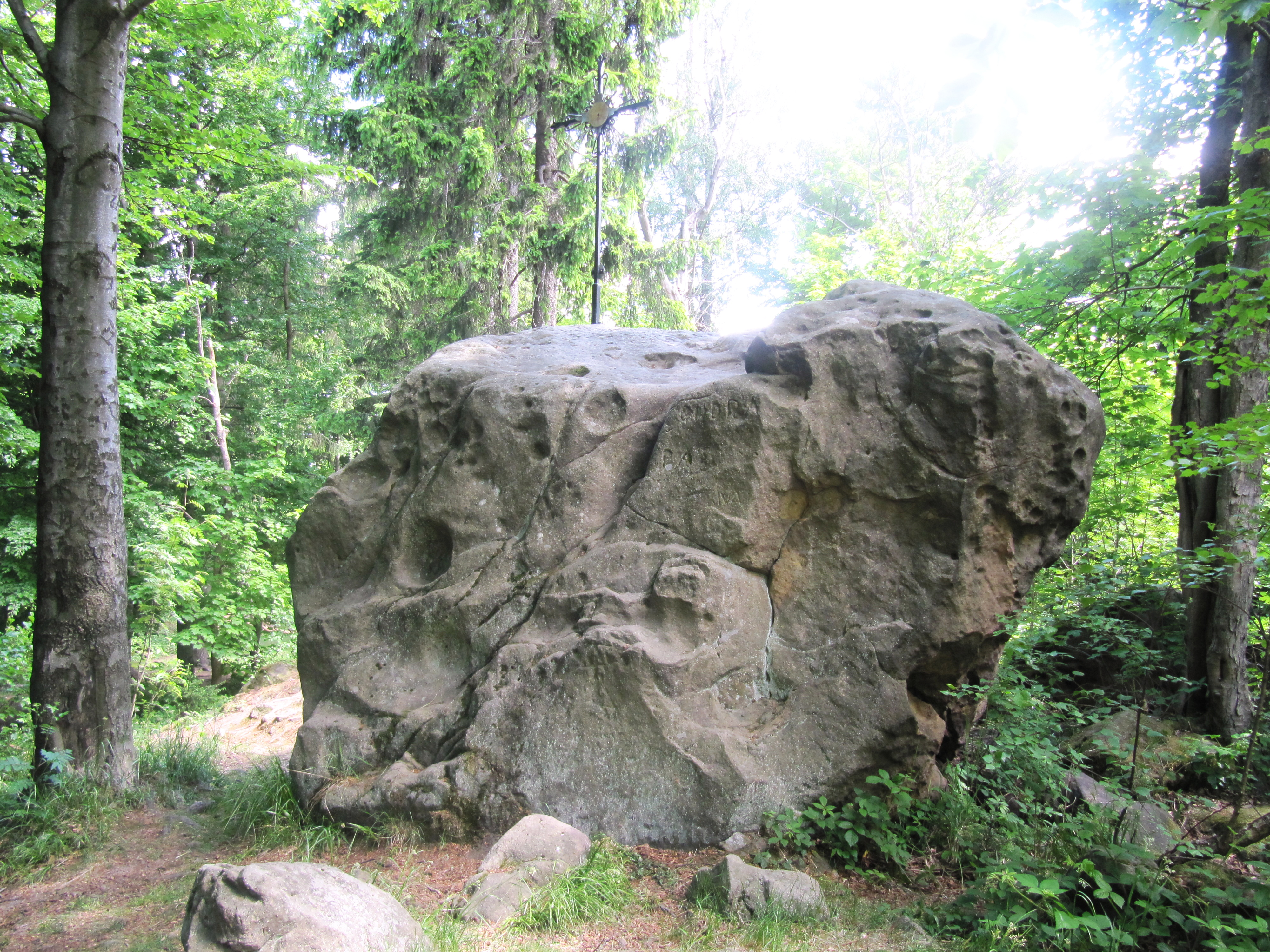 Klášťov